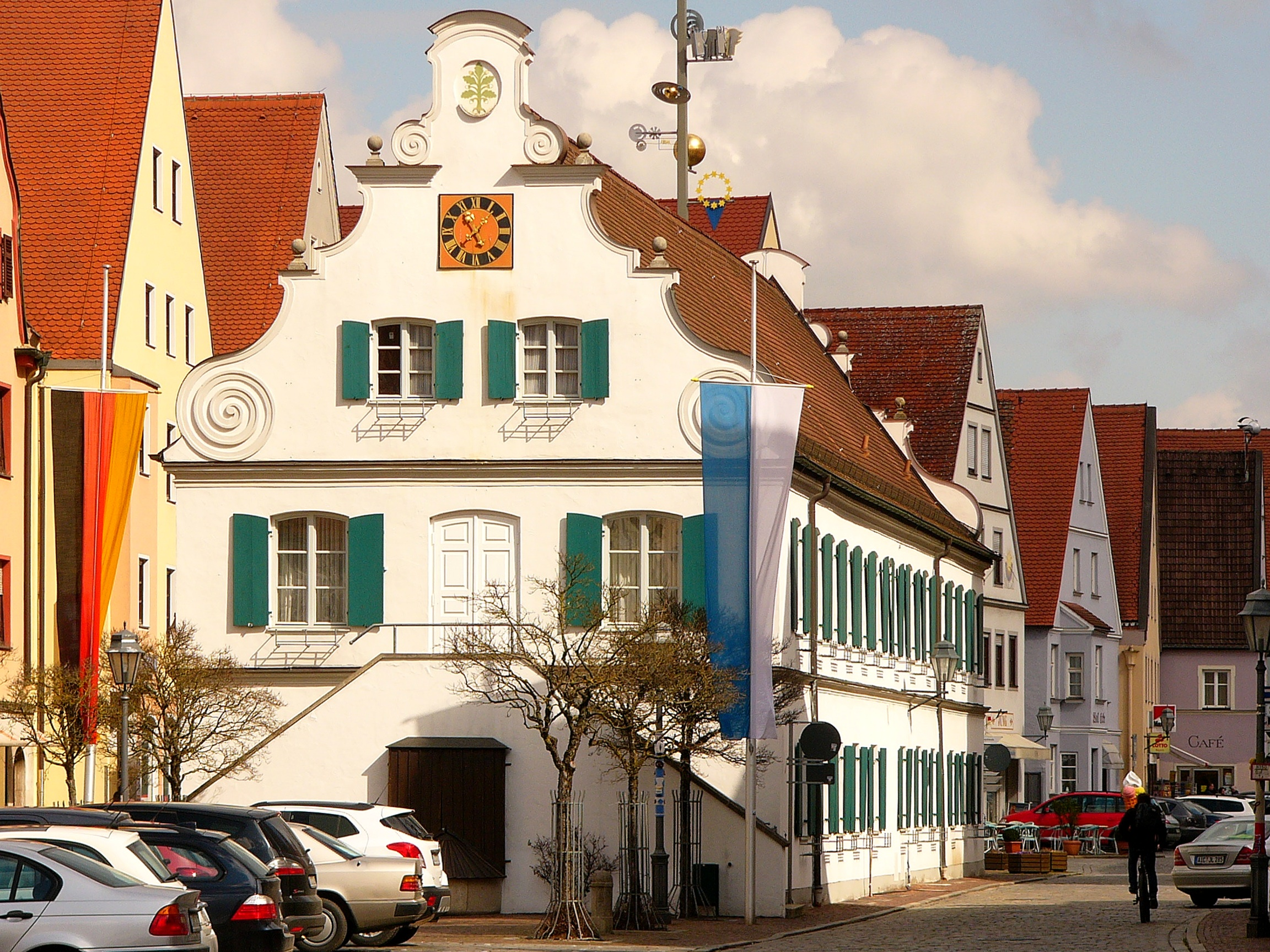 Rathaus; langgestreckter freistehender, zweigeschossiger Satteldachbau mit Volutengiebeln und Freitreppe, 1705/06, mehrfach verändert. This is a photograph of an architectural monument.